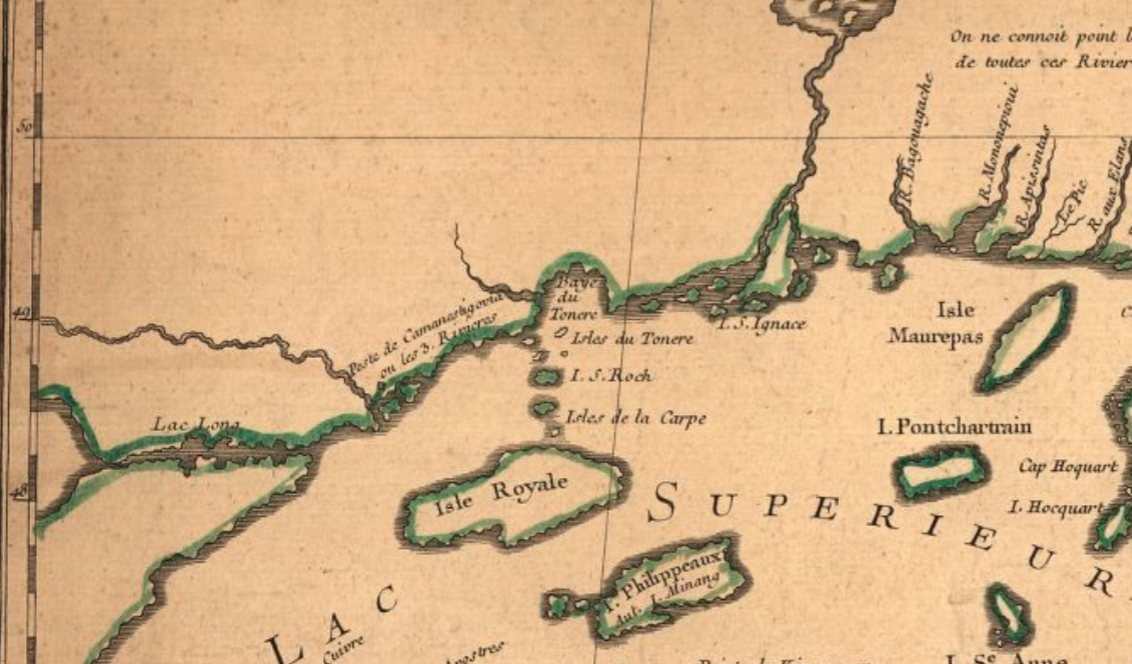 Mention de la Baie du Tonnerre dans la région de Thunder Bay actuel (Ontario, Canada), extrait de la carte Partie occidentale de la Nouvelle France ou Canada de Jacques Bellin